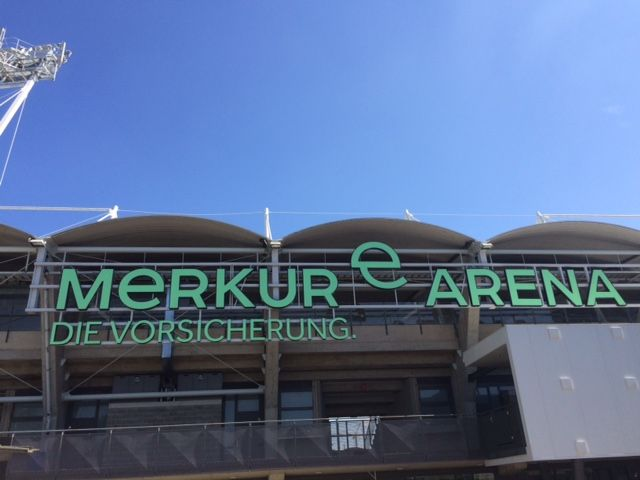 Die Nordseite der Merkur Arena